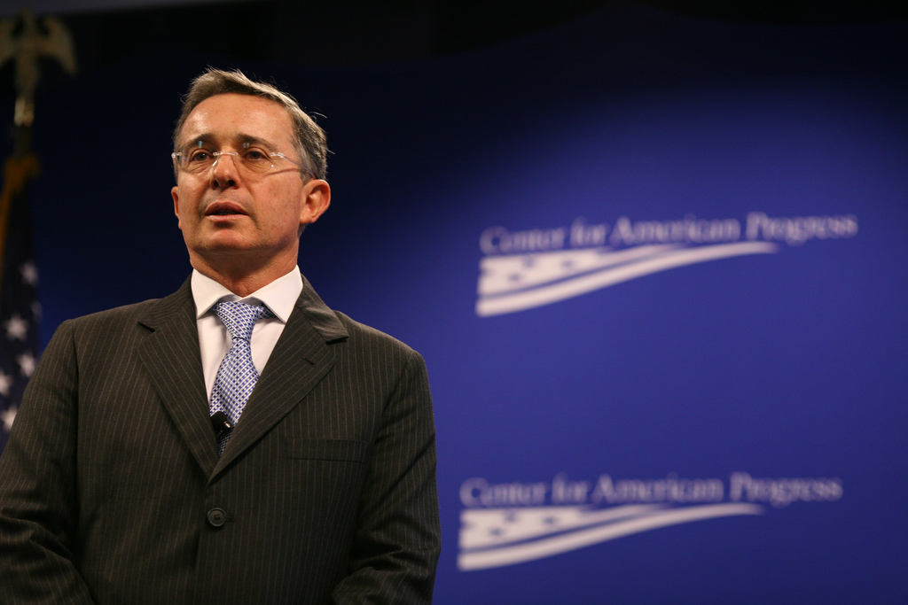 Presidente Álvaro Uribe en rueda de prensa